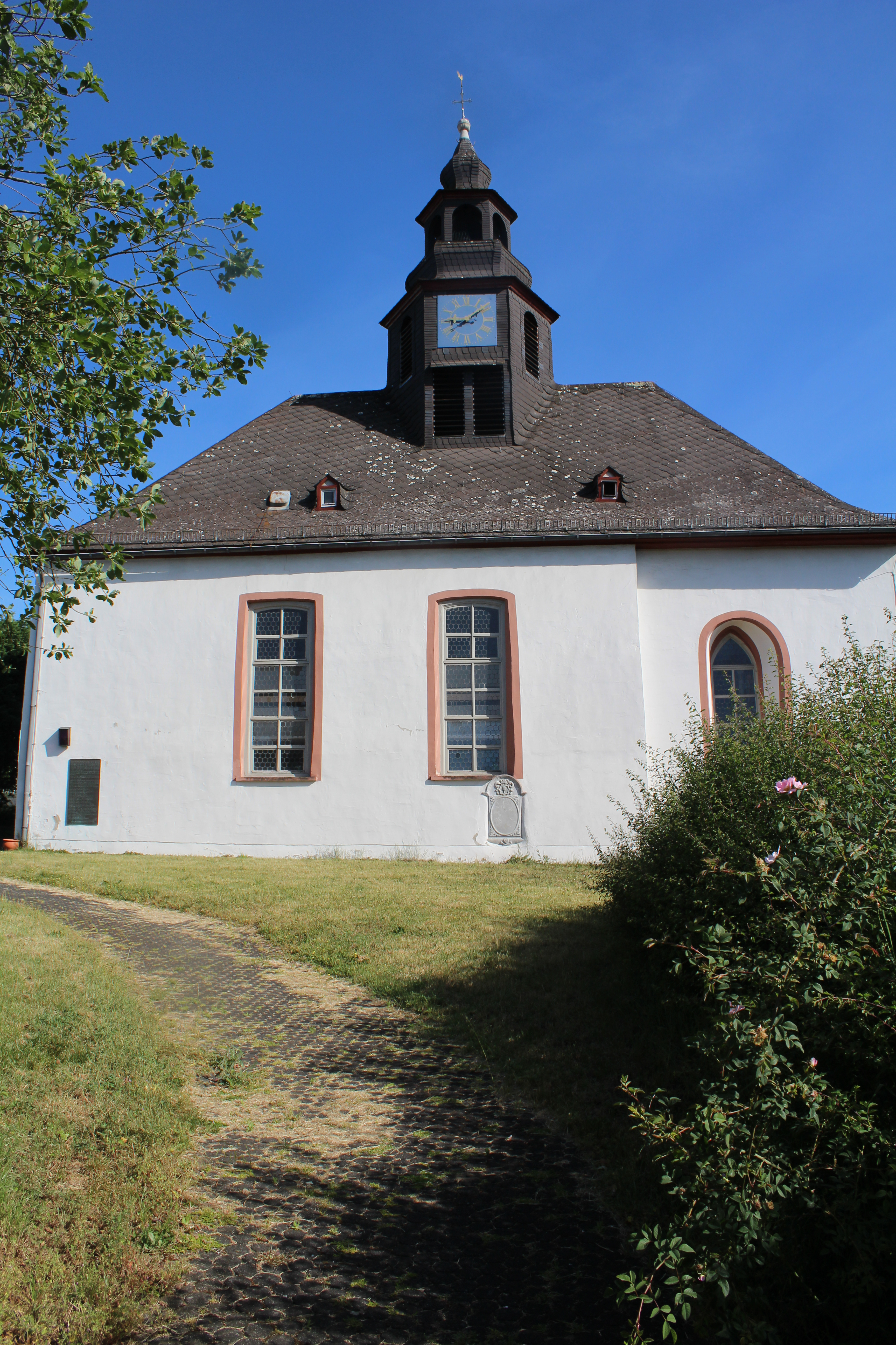 Ev. Kirche Oberbiel, Solms, Lahn-Dill-Kreis, Hessen, Deutschland